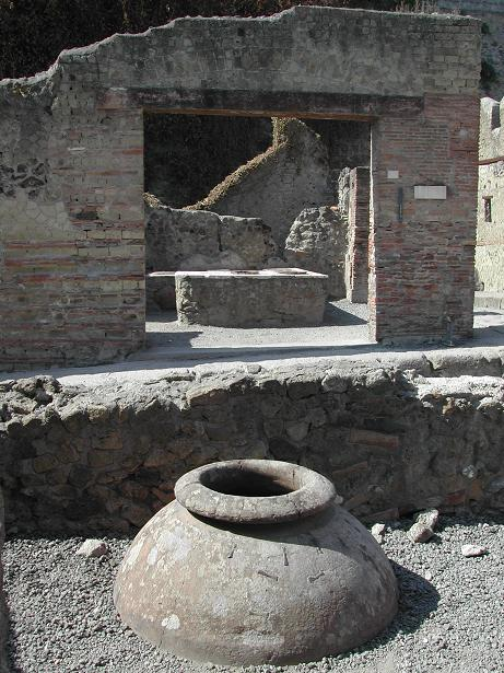 Thermopolium foto di Aldo Ardetti (14 agosto 2007)